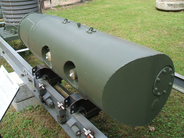 Gefechtsmine MK 36 25 im Marinemuseum, Stralsund.